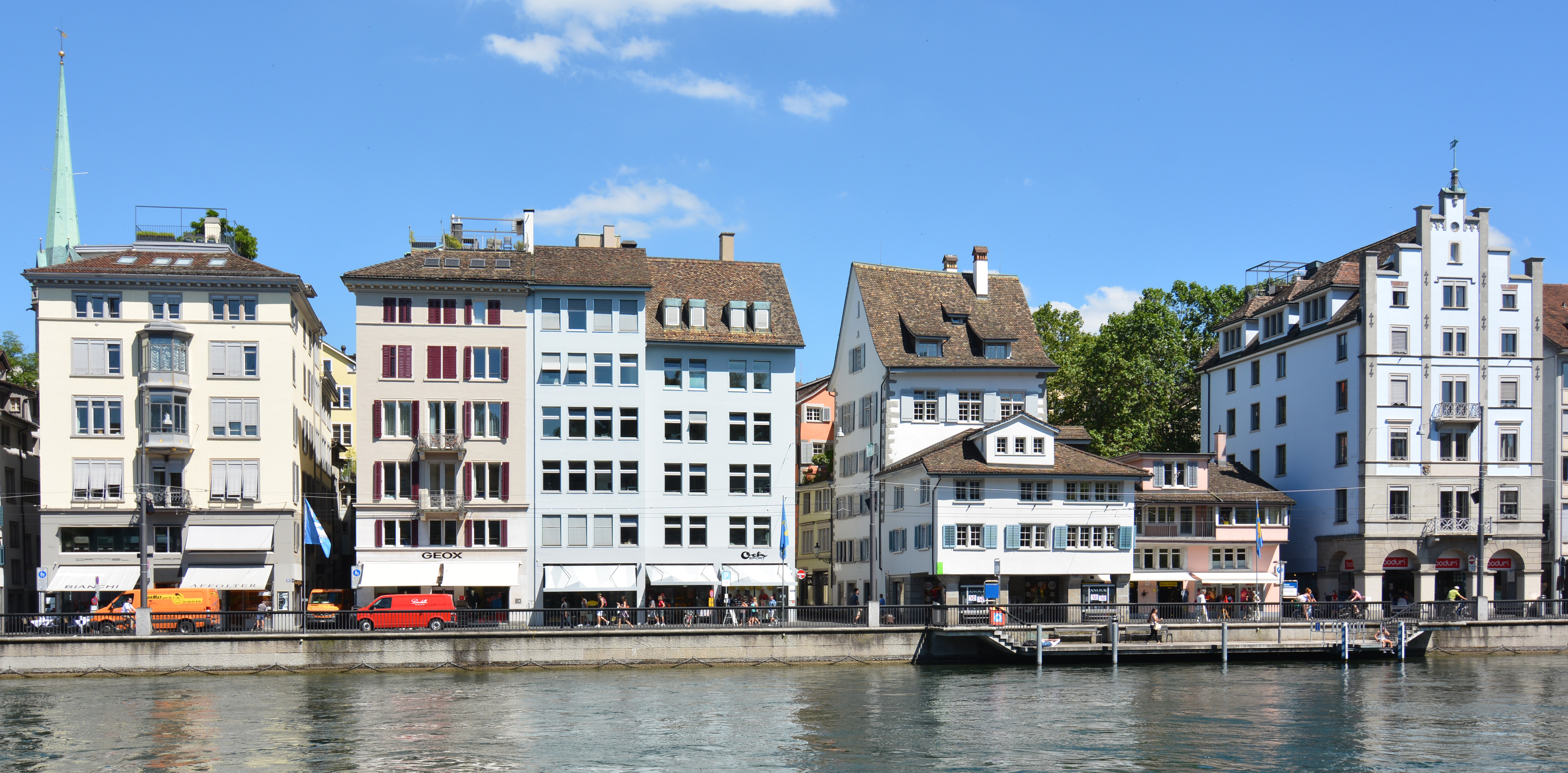 Häuser Limmatquai 82 (links) bis 72 (rechts), Zürich. Nummer 82: Zum Grossen Schiff, 1858–1860 durch Wilhelm Waser erbaut. Jugendstilerker von 1903 Nummer 80: Gerwi, ehem. Zunfthaus zur Gerwe, 1856 durch Wilhelm Waser vollständig umgebaut. Nummer 72: Ehem. Hotel Schweizerhof, 1859 durch Wilhelm Waser erbaut. Seit 1918 Wohn- und Geschäftshaus.